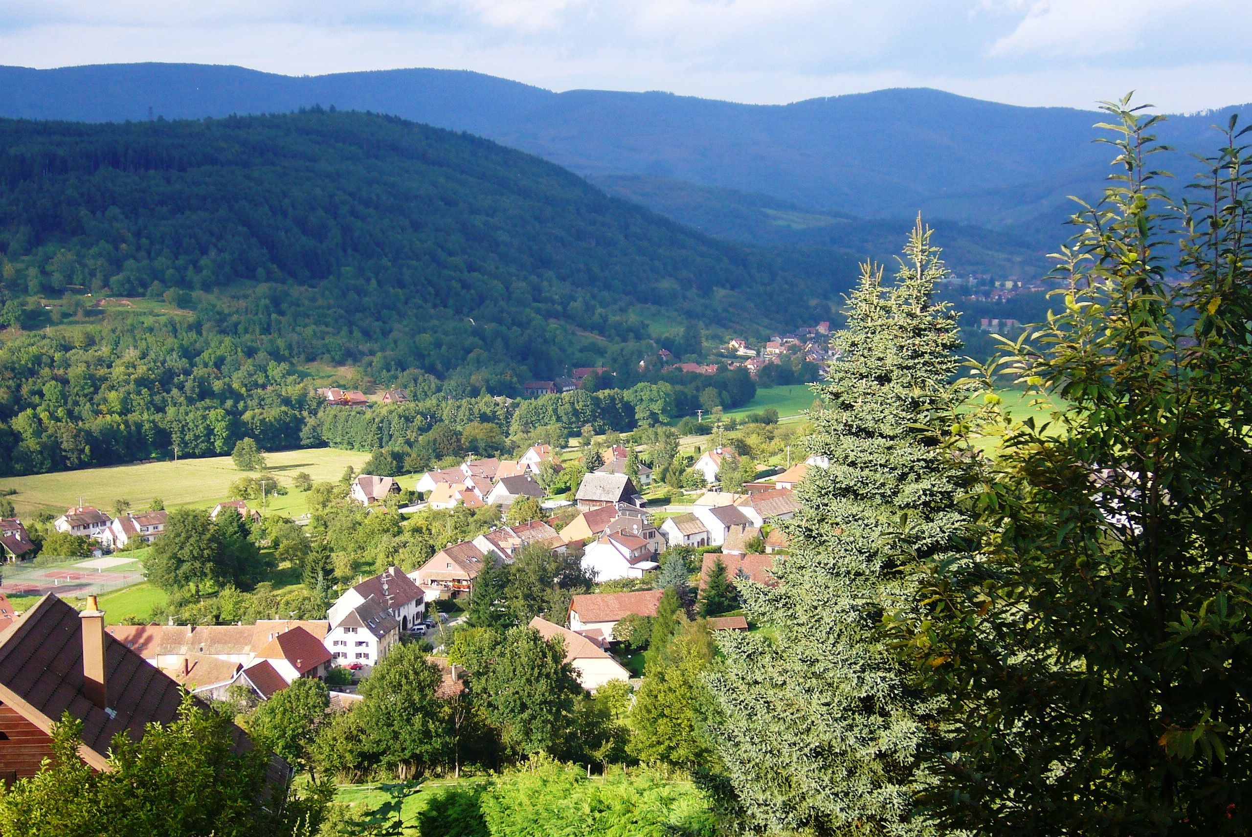 Vue partiel sur le village de Fouchy en direction du sud